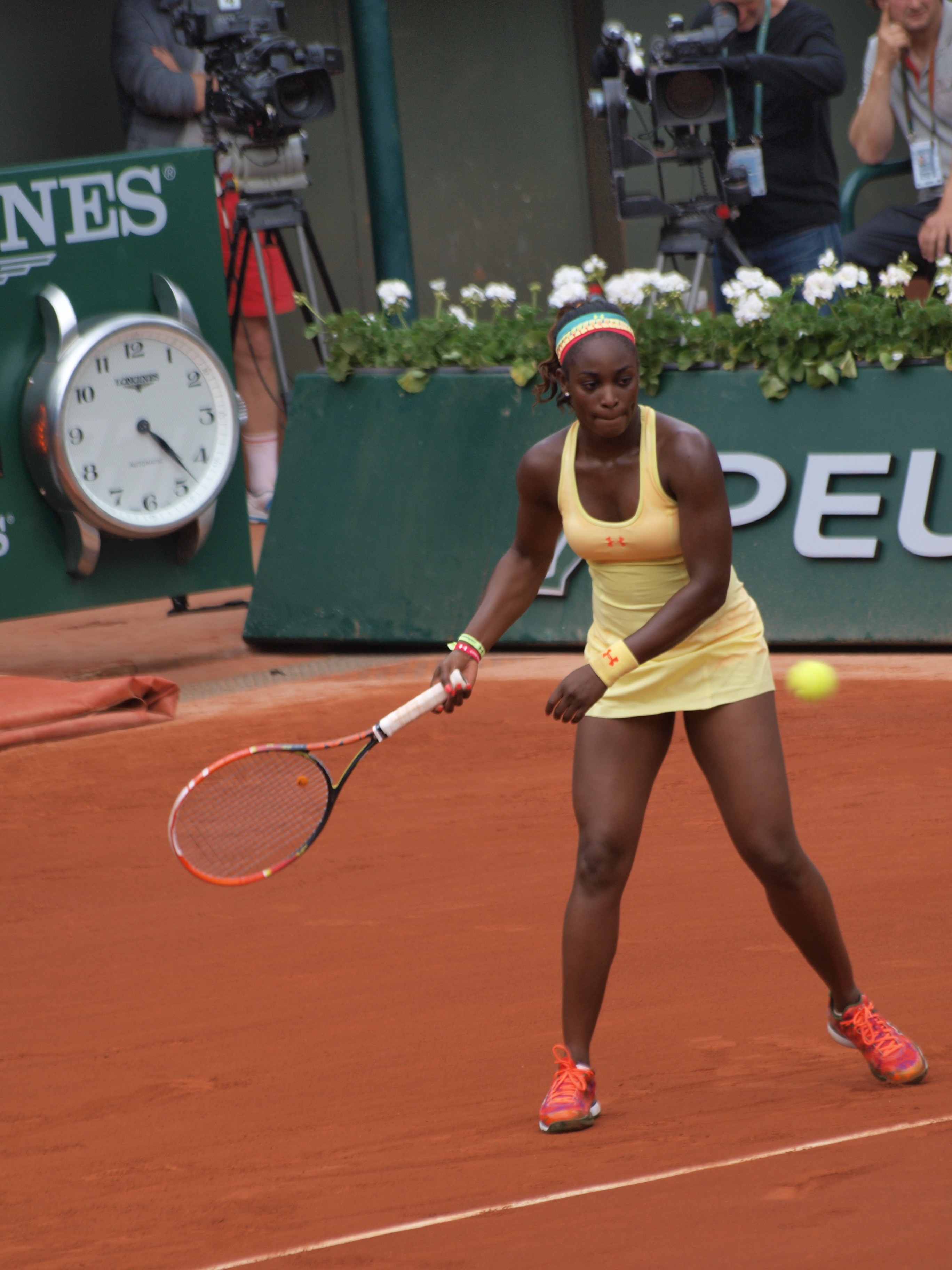 Internationaux de France de tennis, le 2 juin 2014, sur le court Philippe Chatrier : Sloane Stephens